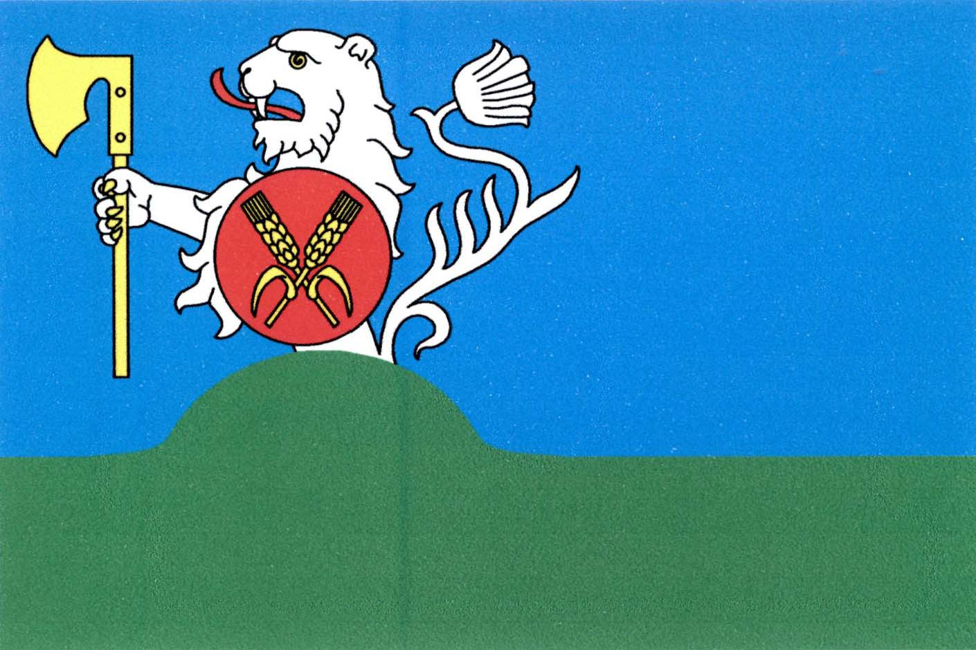 Vlajka obce Chraberce